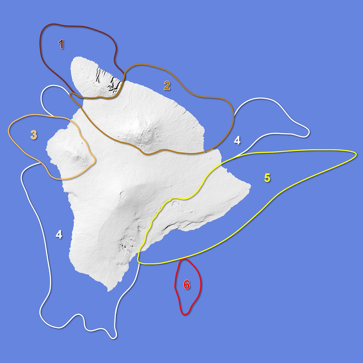 Схема границ вулканов острова Гавайи. Иллюcтрация для викиучебника Гавайеведение